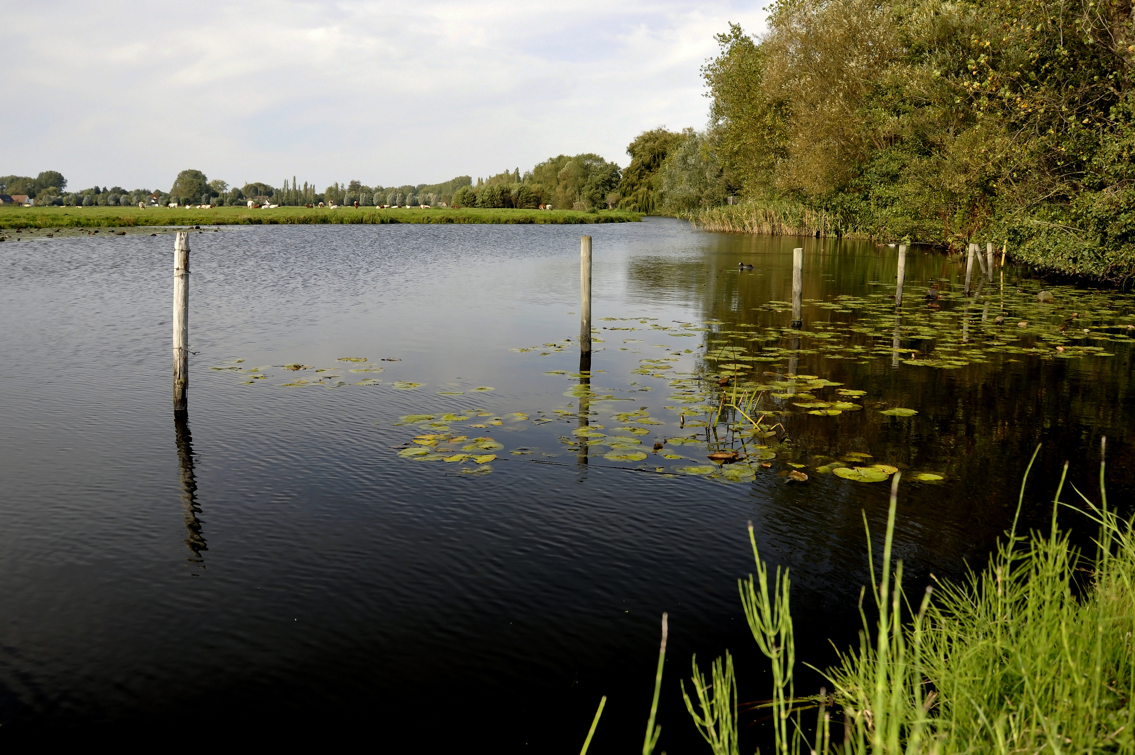 De Piereput, een poel van de Oude Leie in het natuurgebied Assels te Drongen, België